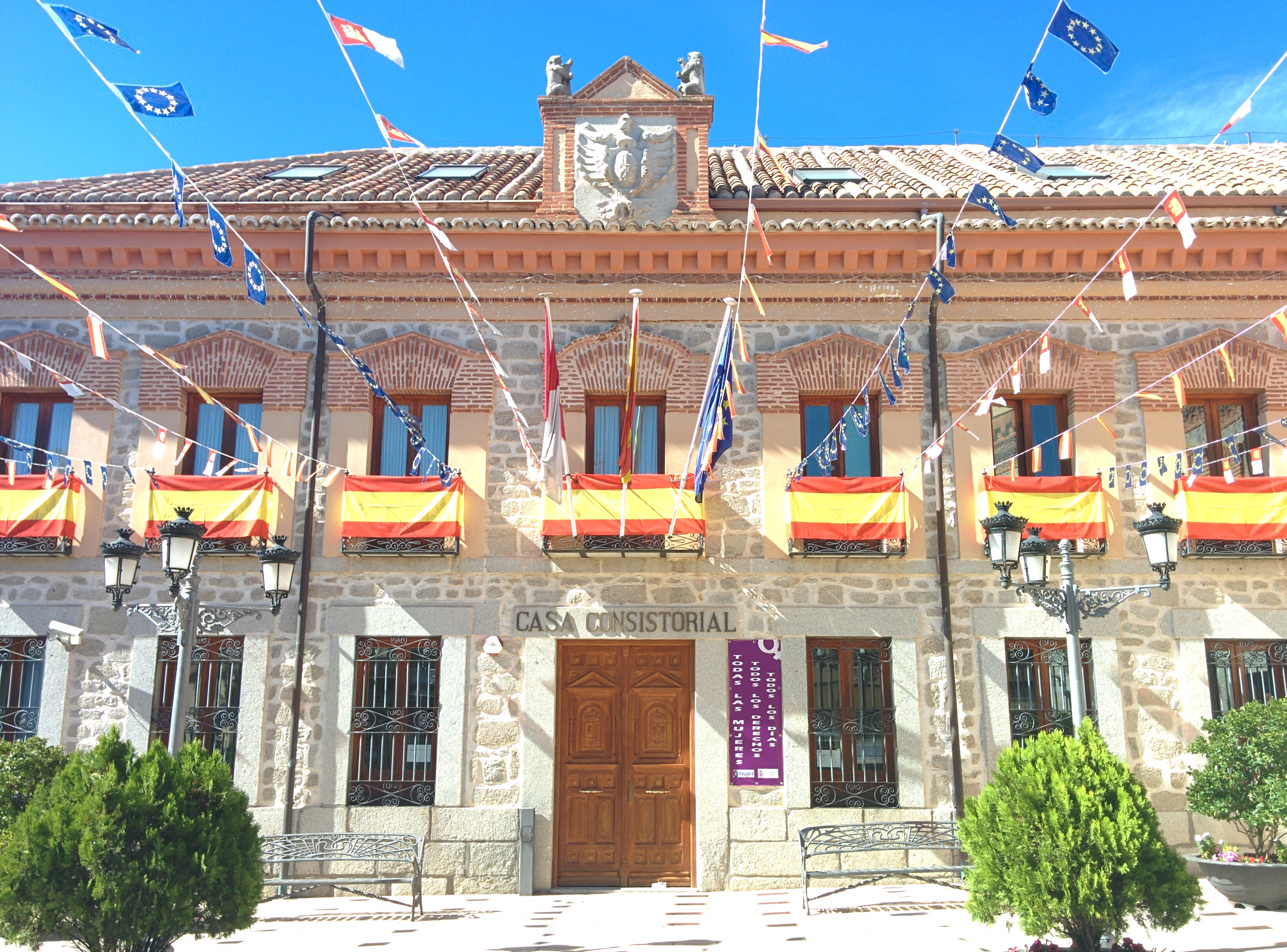 Casa consistorial de Sonseca (Toledo, España).